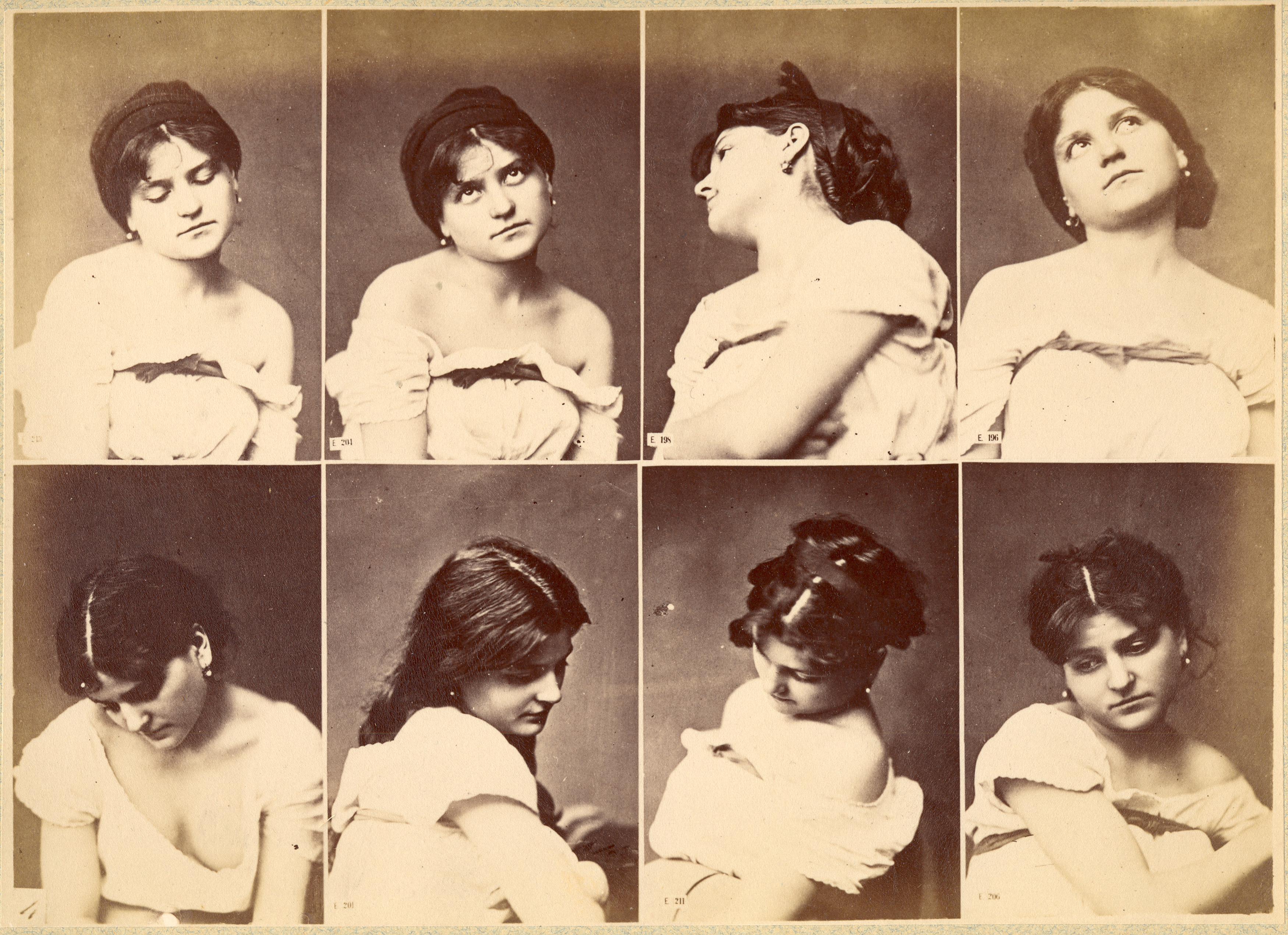 Frauenstudien